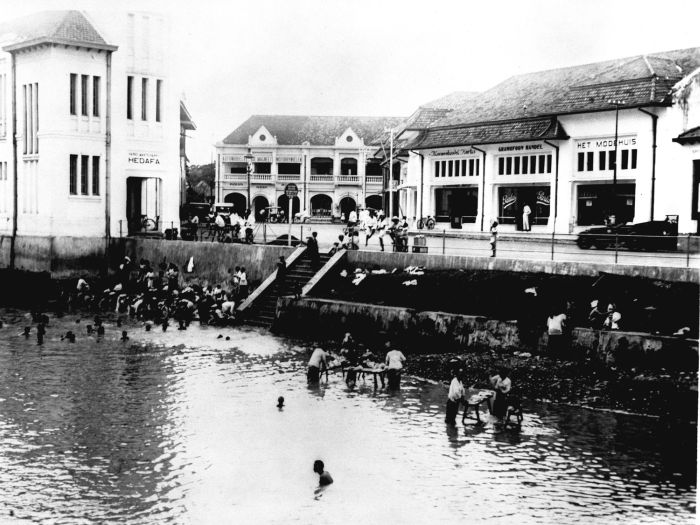 Foto. Wasplaats aan de Molenvliet te Batavia, Java.